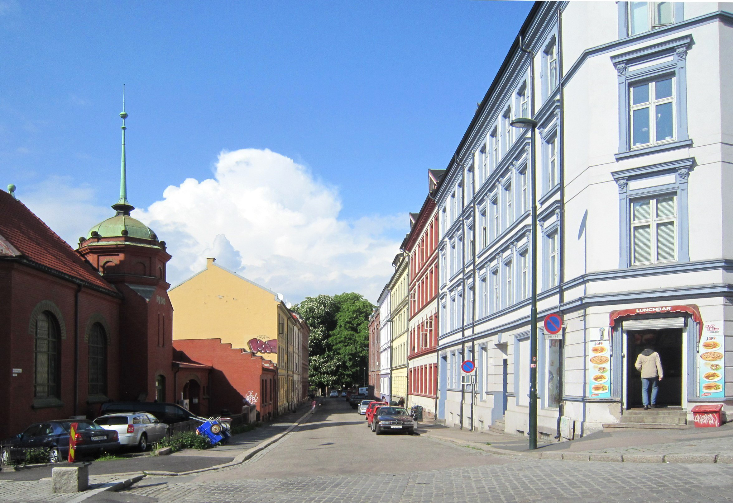 Alnafetgata i Gamlebyen i Oslo